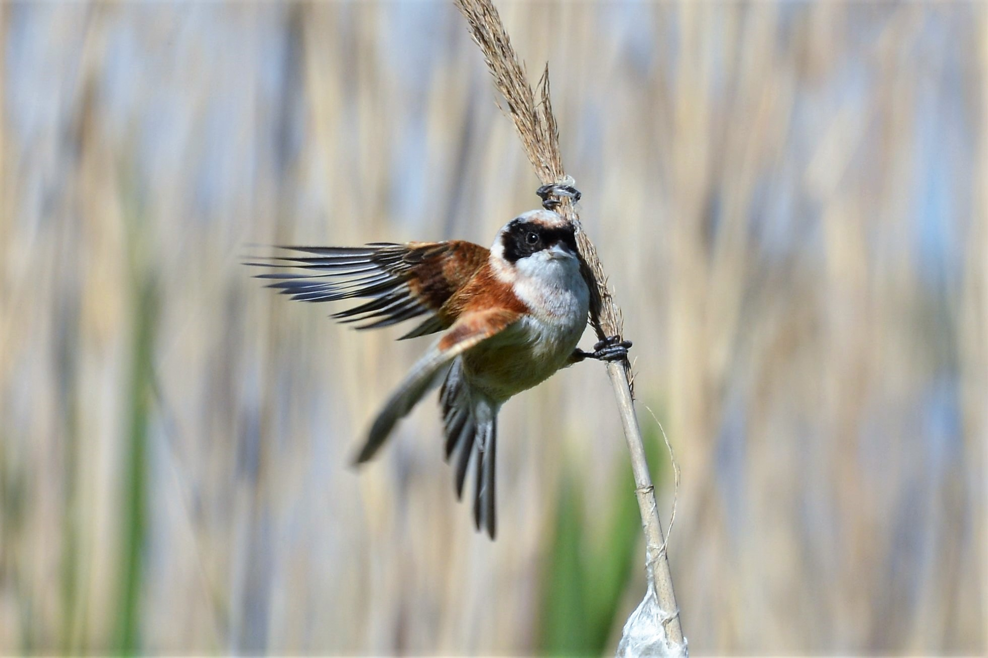 Згарський, Жмеринський р-н, Літинський р-н